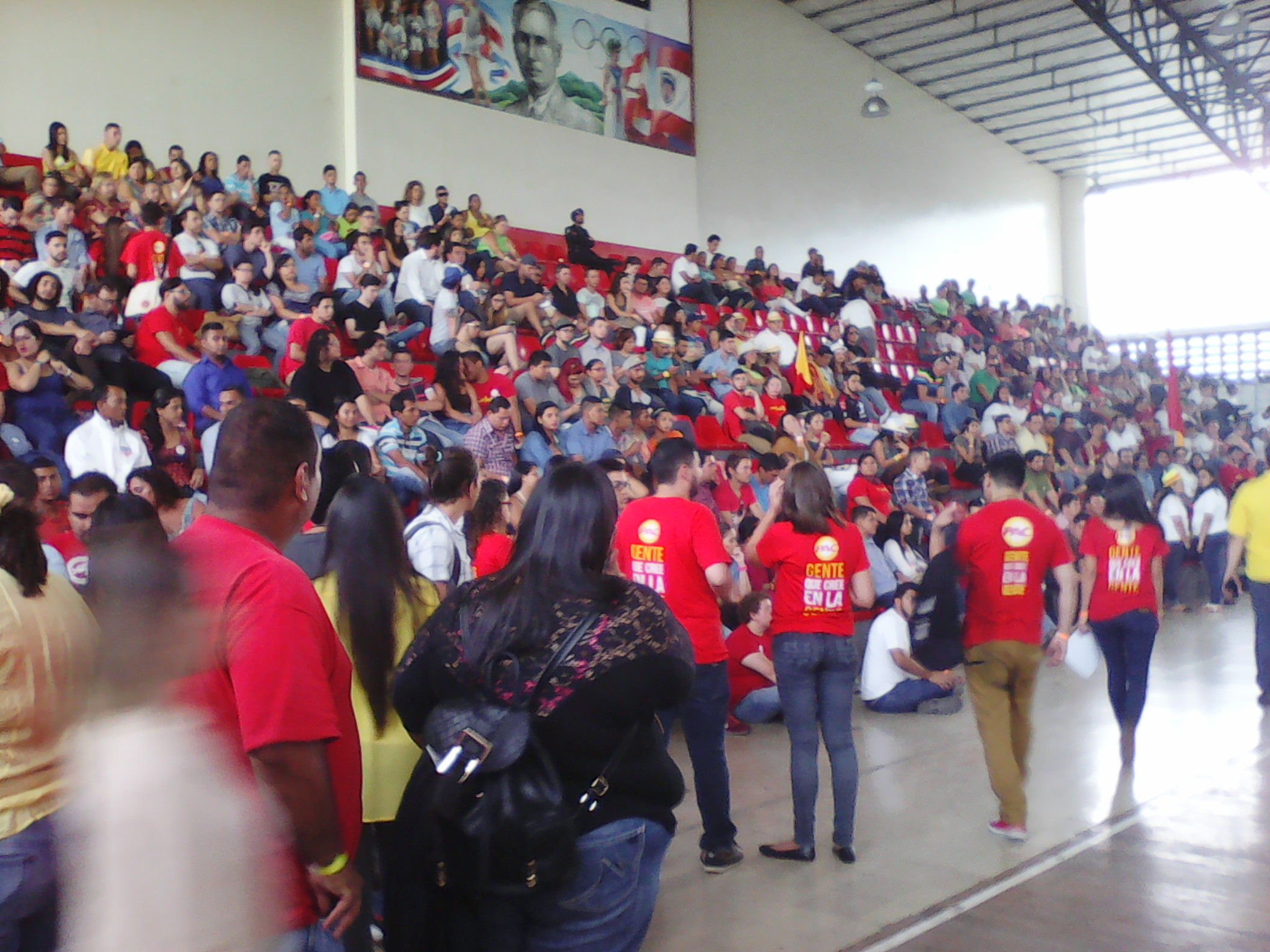 Asamblea General de Juventud PAC 2016, Liceo de Costa Rica